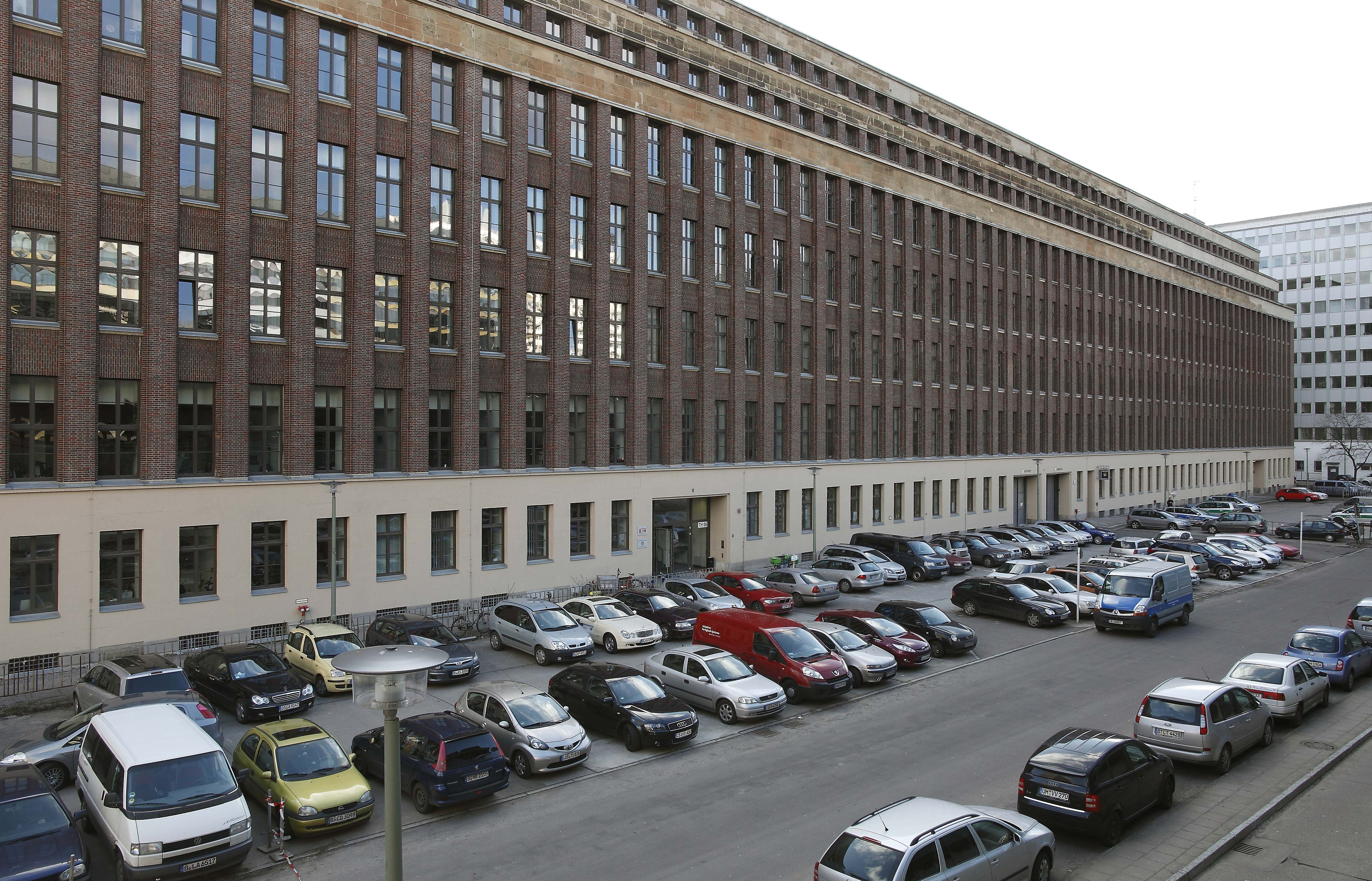 Geschäftsräume der Berliner Immobilienmanagement GmbH